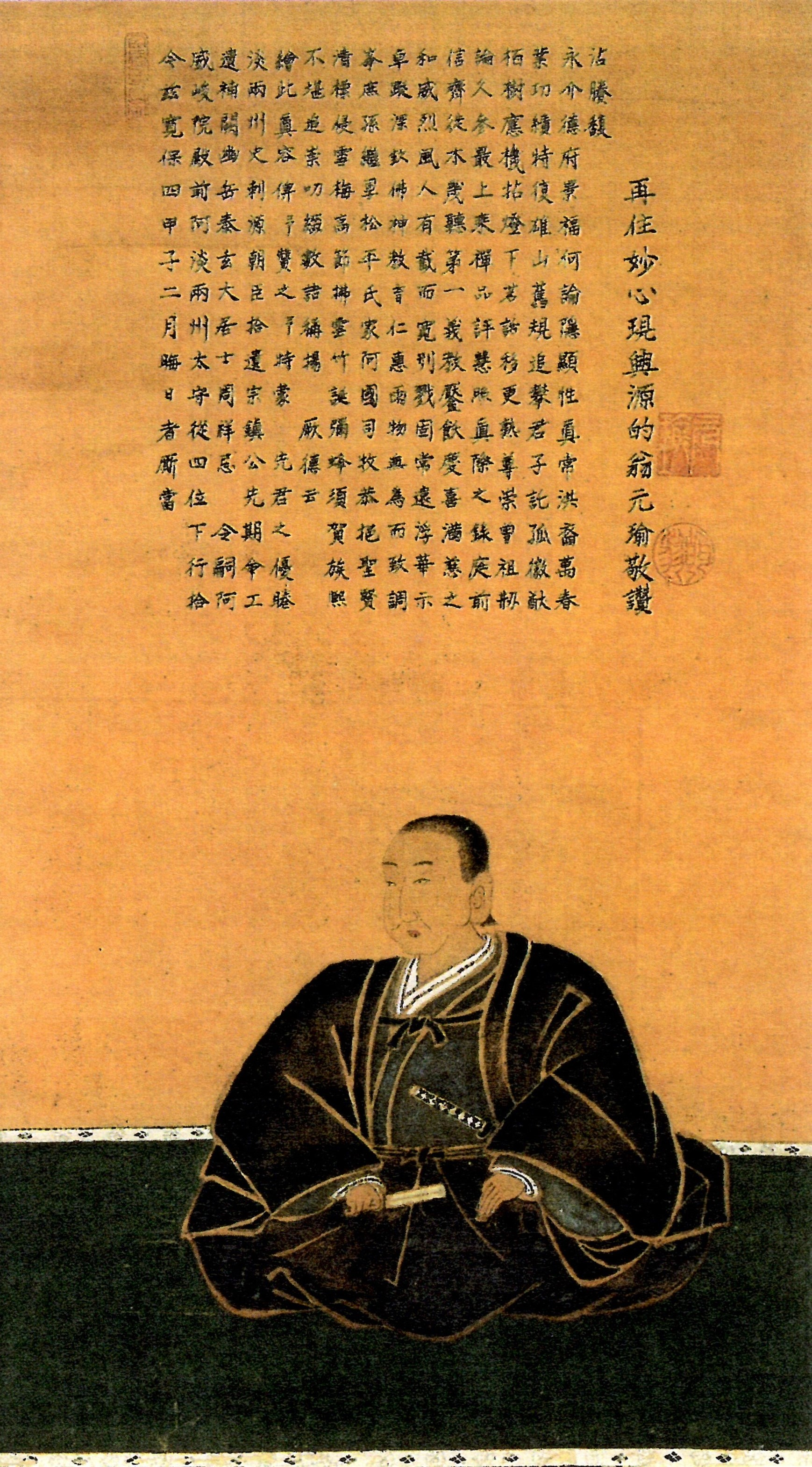 蜂須賀宗英の肖像。